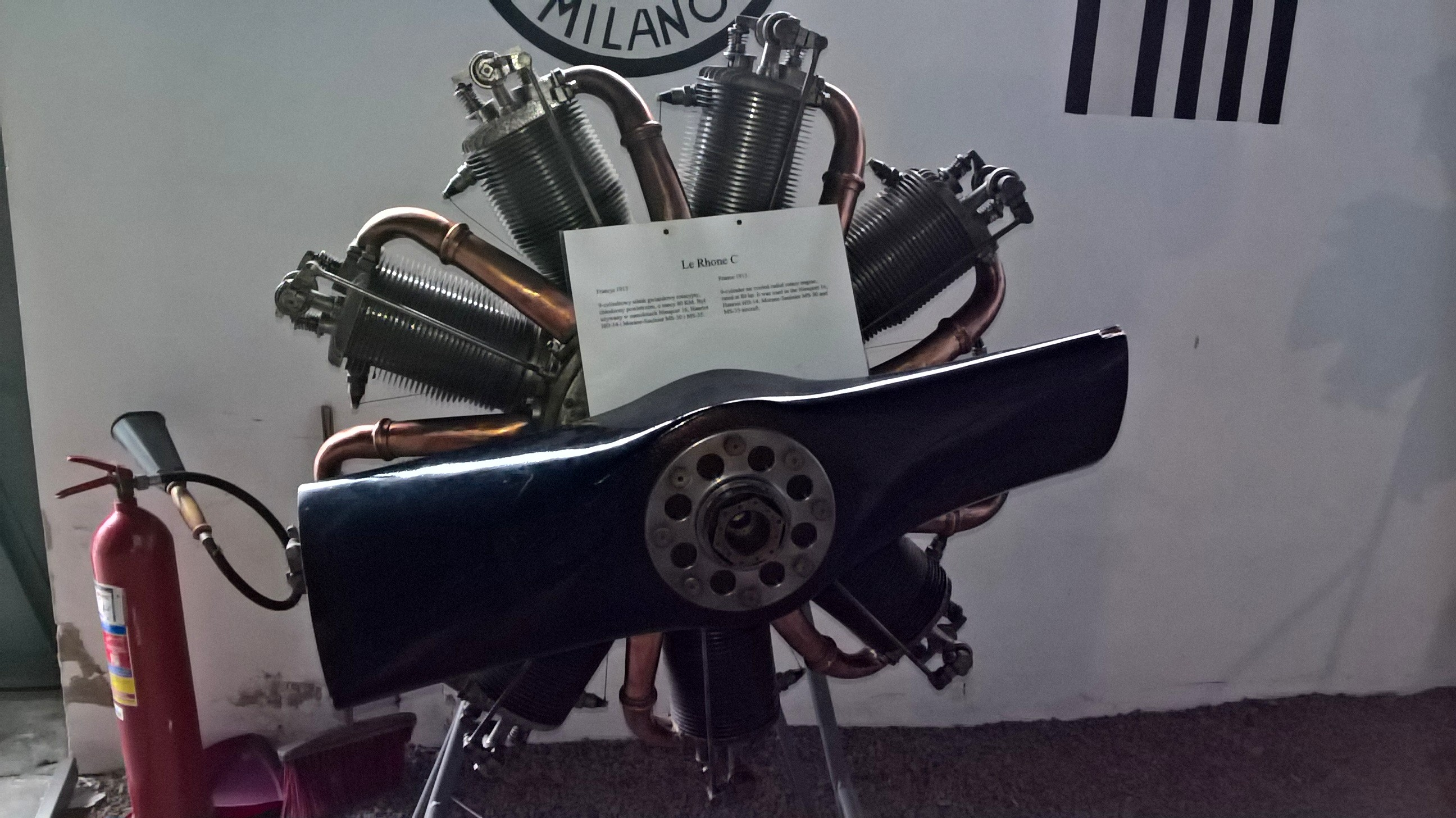 Francuski 9-cylindrowy silnik rotacyjny Le Rhône 9C z 1913 r. ze zbiorów Muzeum Lotnictwa Polskiego w Krakowie.